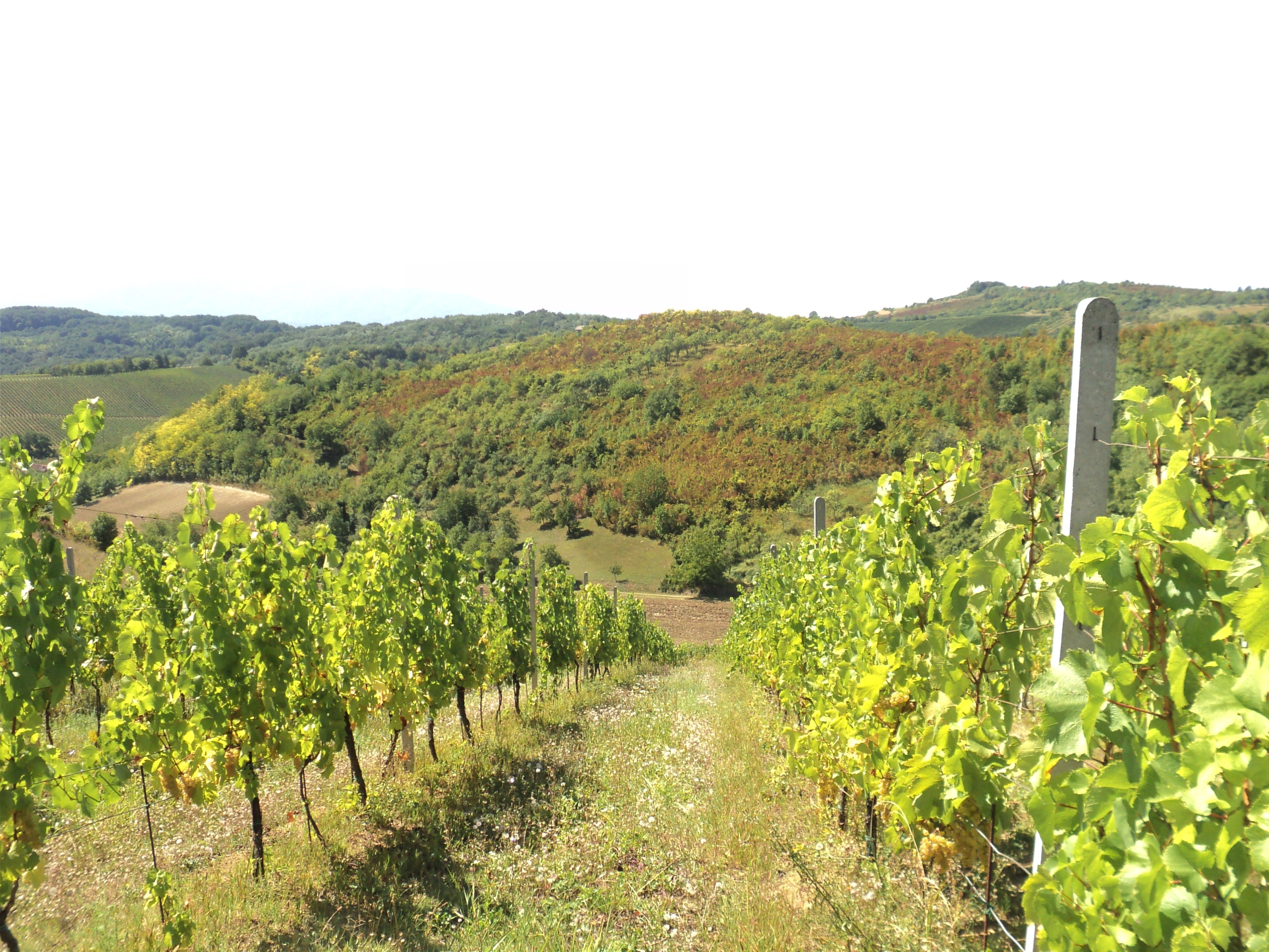 Dilja gora kod Brodskog Stupnika